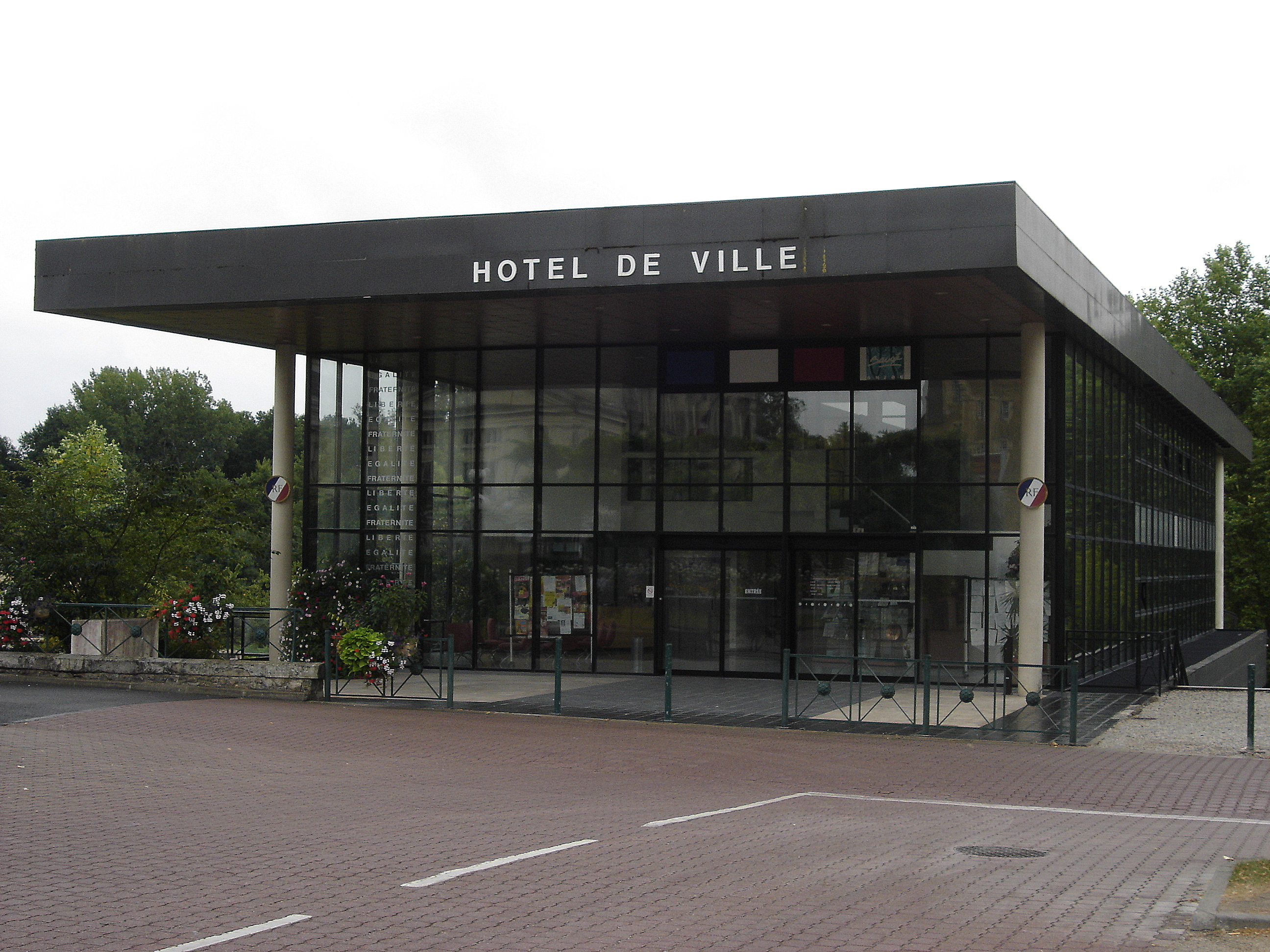 Hotel de ville de Baugé (Maine-et-Loire)